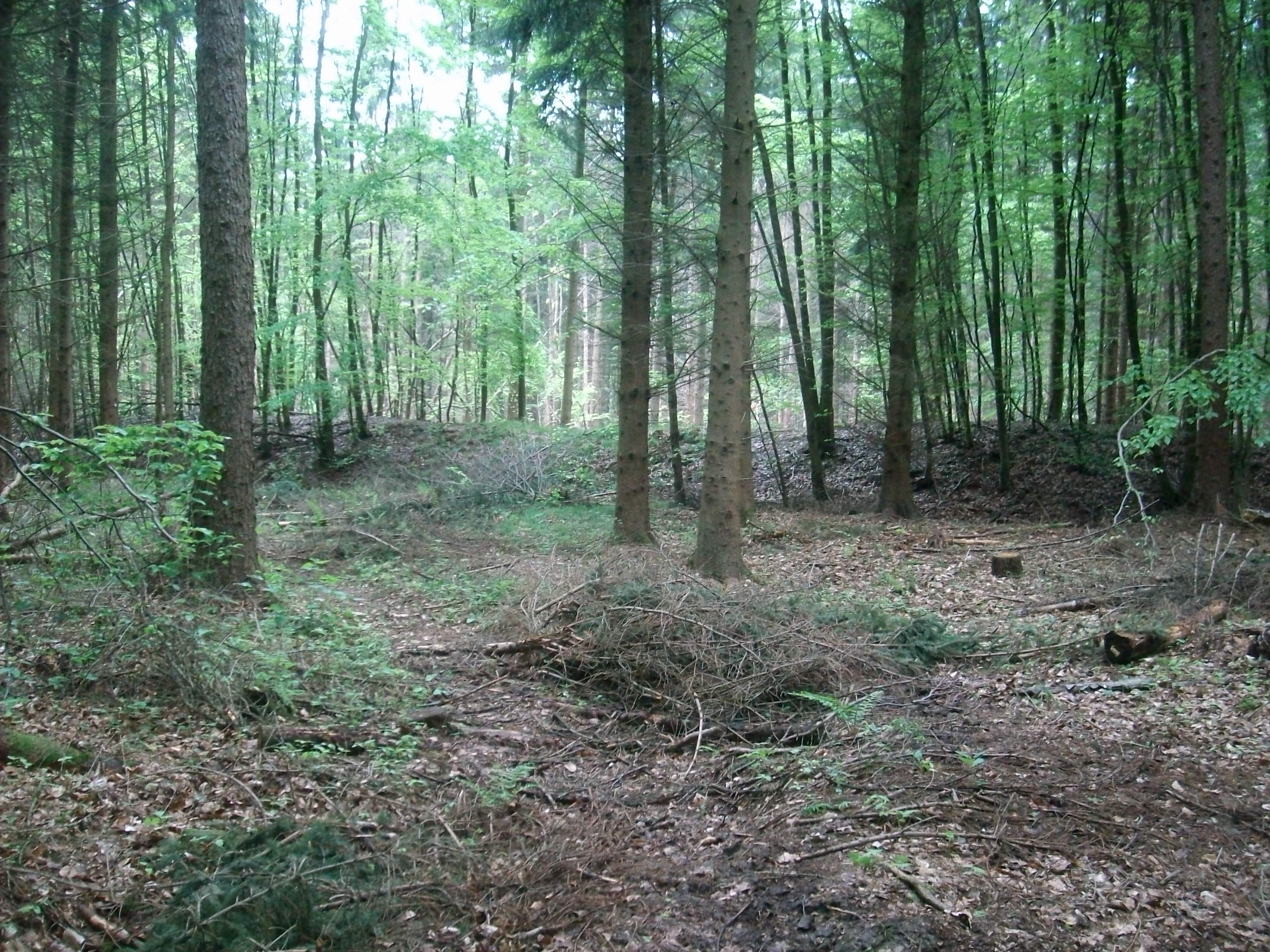 Blick auf den Südwall des ehemaligen römischen Lagers Alteburg bei Oberbrechen